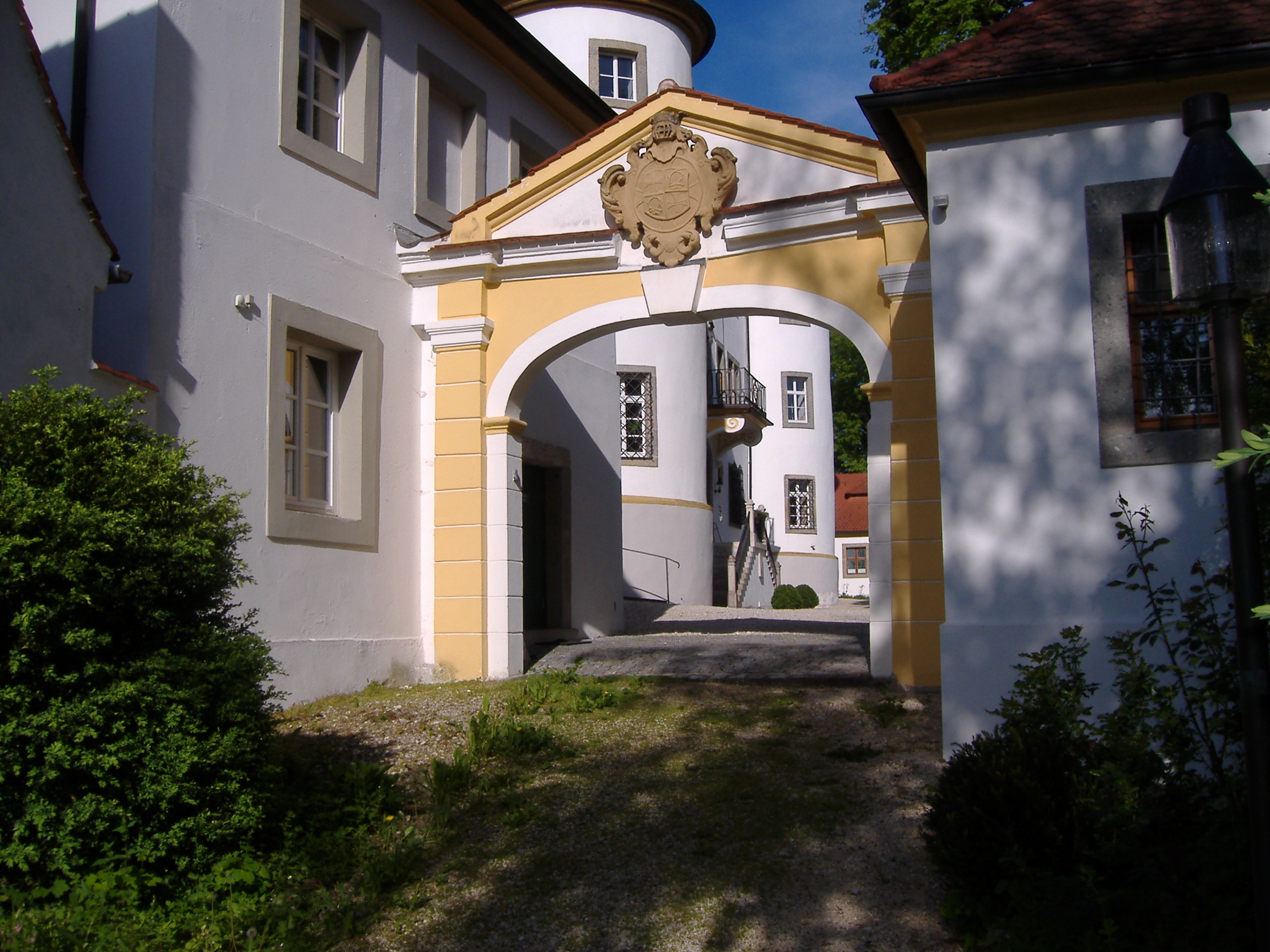 Schloss Reimlingen, mit Wappen des Deutschordenkomturs Karl Heinrich Freiherr von Homstein